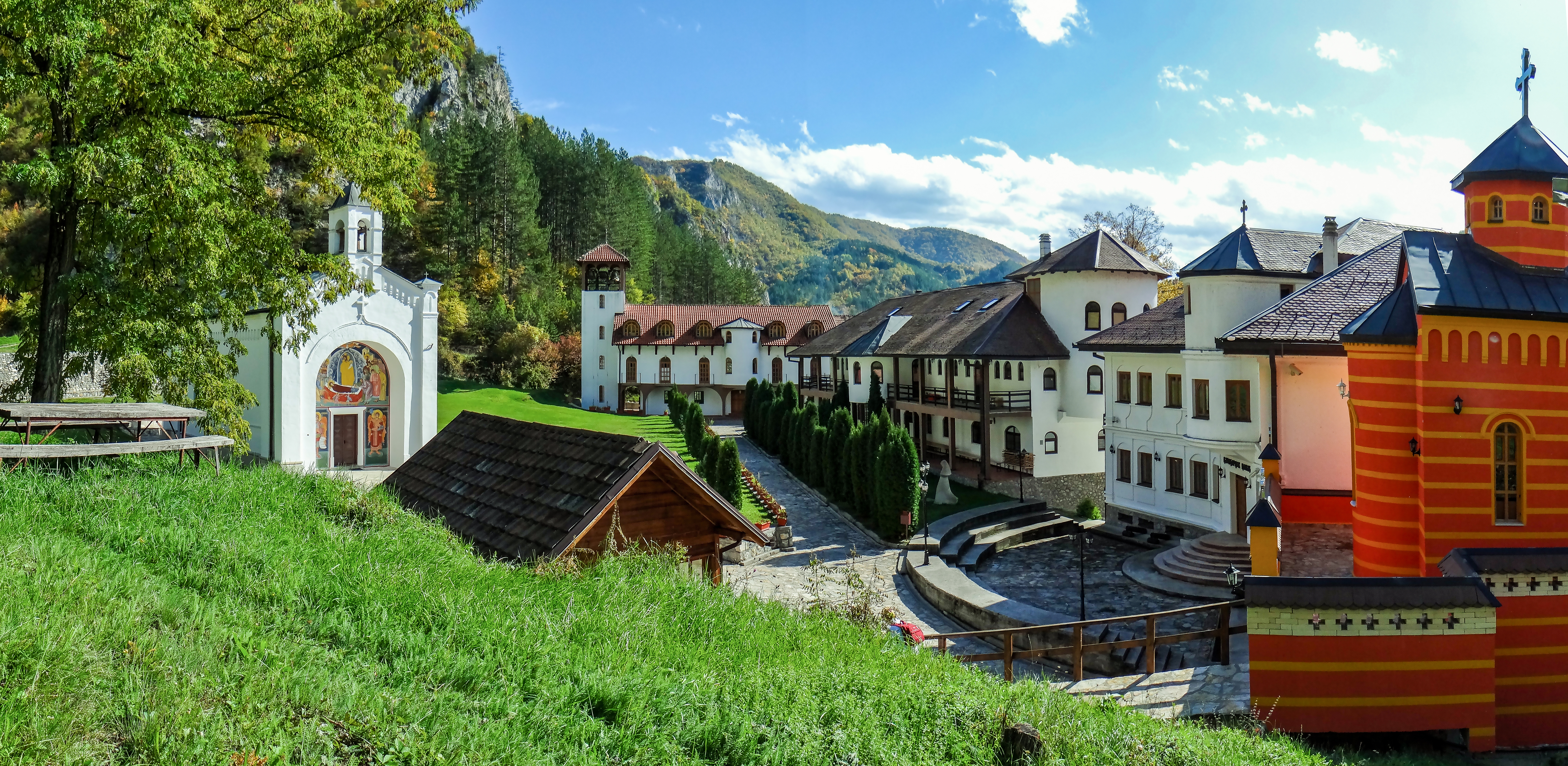 This image was uploaded as part of Trace of Soul 2016. Добрун, панорама